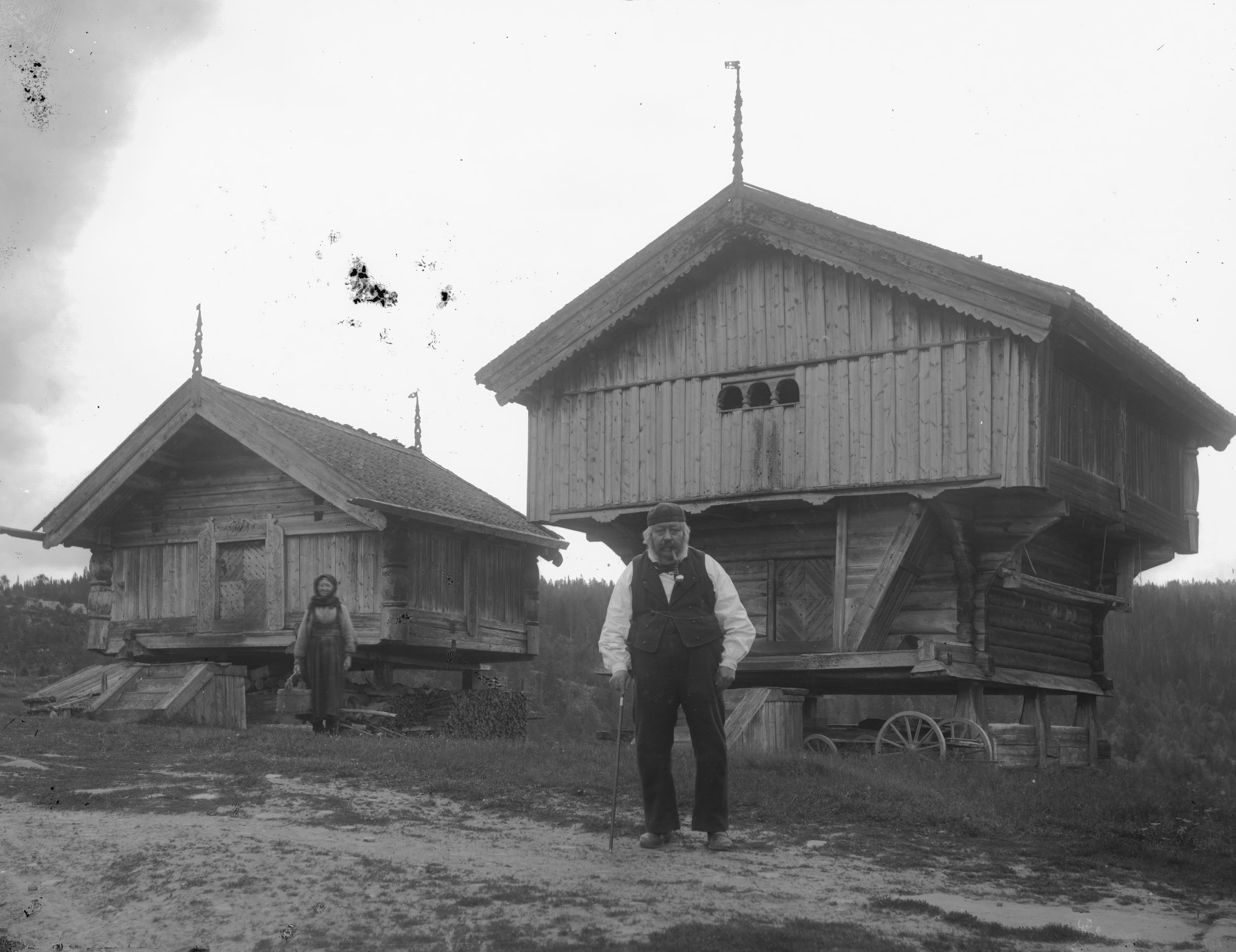 Påskrift negativ: [Uleselig] Påskrift konvolutt: B-169 Gransherrad, Bolkesjø. Uppigard Gnr 38 bnr 8 (Nå 134/8) loft og bur [Riksantikvaren] Sted: Bolkesjø,Gransherad Kommune: Notodden Fylke: Telemark Tagger: stabbur loft mann kvinne "Uppigard"